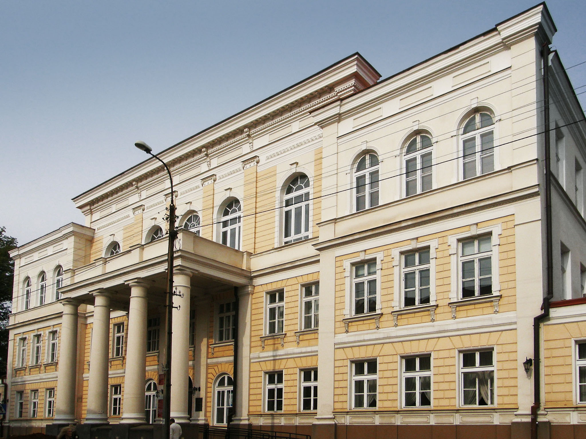 Białystok, ul. Warszawska 63 - dom / "Kamienica pana Trębickiego", obecnie Wydział Ekonomiczny Uniwersytetu w Białymstoku (zabytek nr A-150 z 30.12.1975)